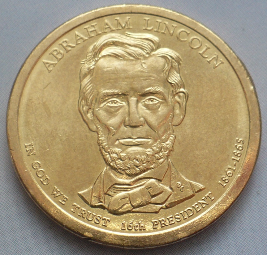 Изображение/Монета 1 доллар США